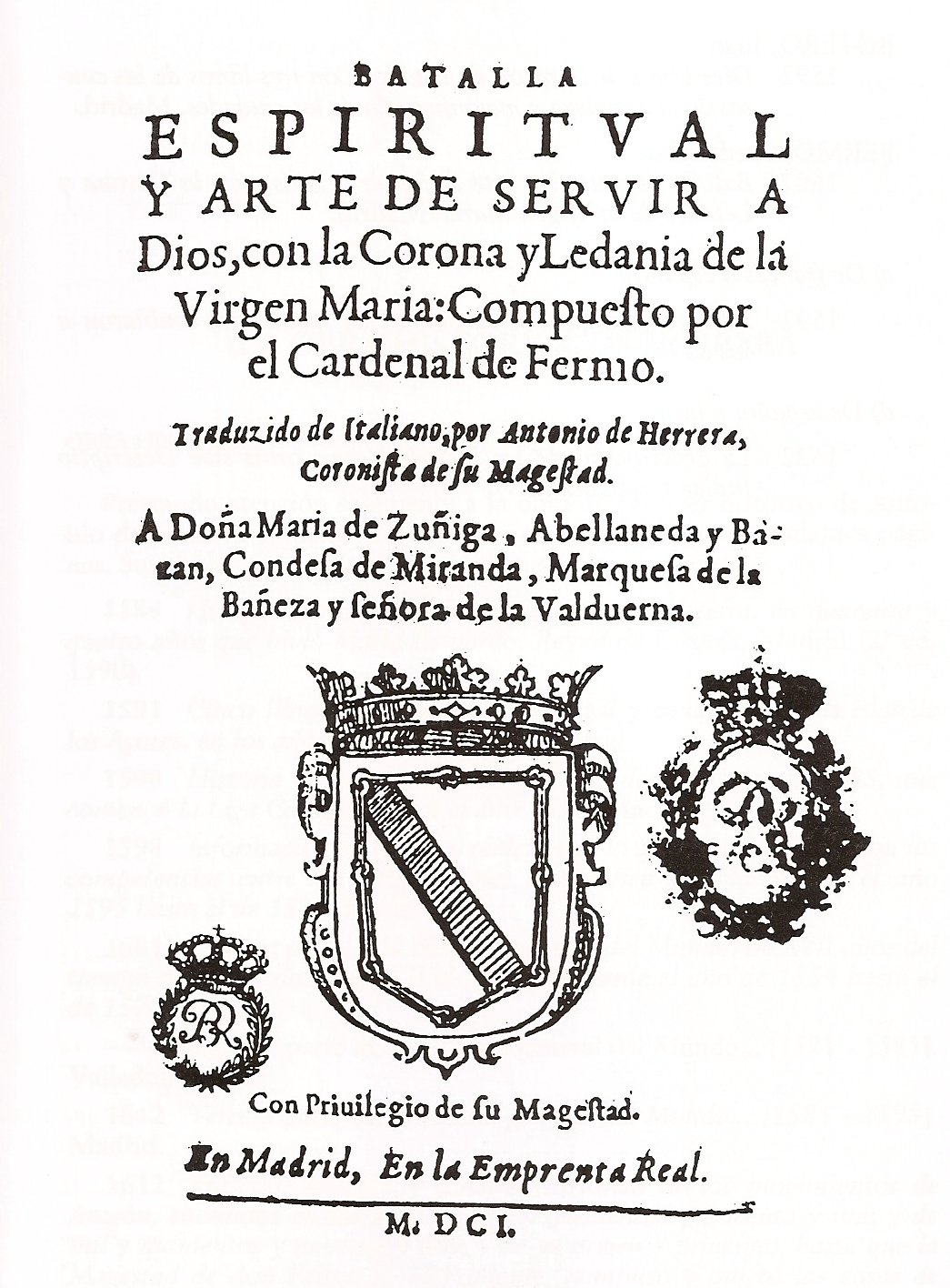 Portada de la obra "Batalla espiritual y arte de servir a Dios, con la Corona y Ledanía de la Virgen María...", traducción de Antonio de Herrera y Tordesillas de la obra del cardenal de Fermo, 1601.